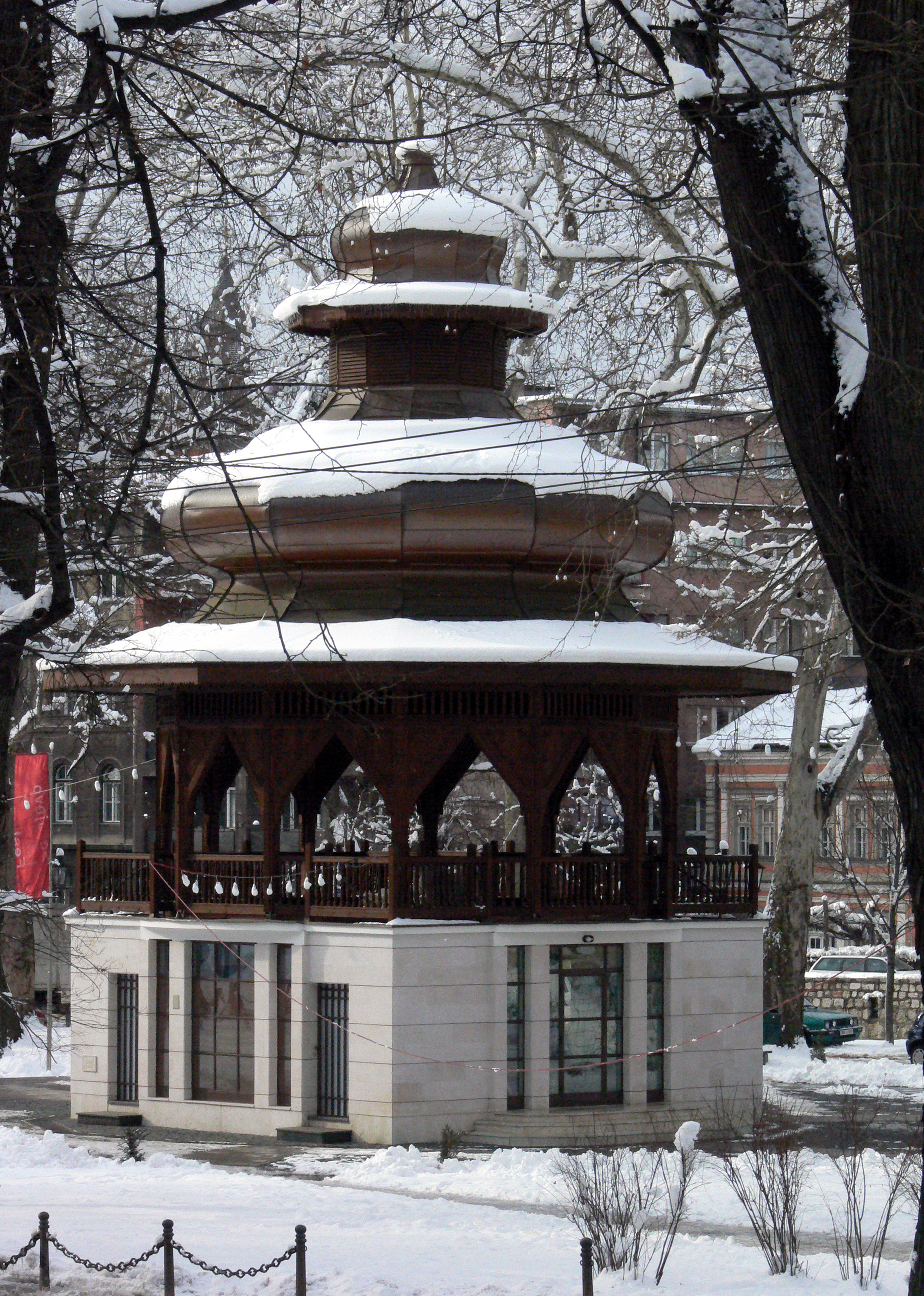 The Admejdan in Sarajevo